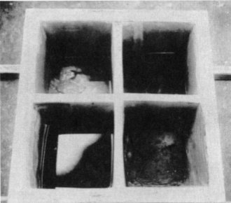 Kanopentruhe aus dem Grab der Hetepheres (G 7000x), Giza, 4. Dynastie, ca. 2600 v. Chr.